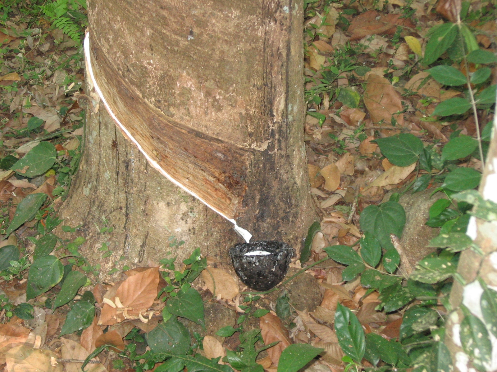 ടാപ്പിങ്ങ് കഴിഞ്ഞ റബ്ബർ മരം